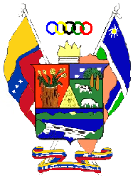 Escudo del municipio San Genaro de Boconoíto, estado Portuguesa, Venezuela